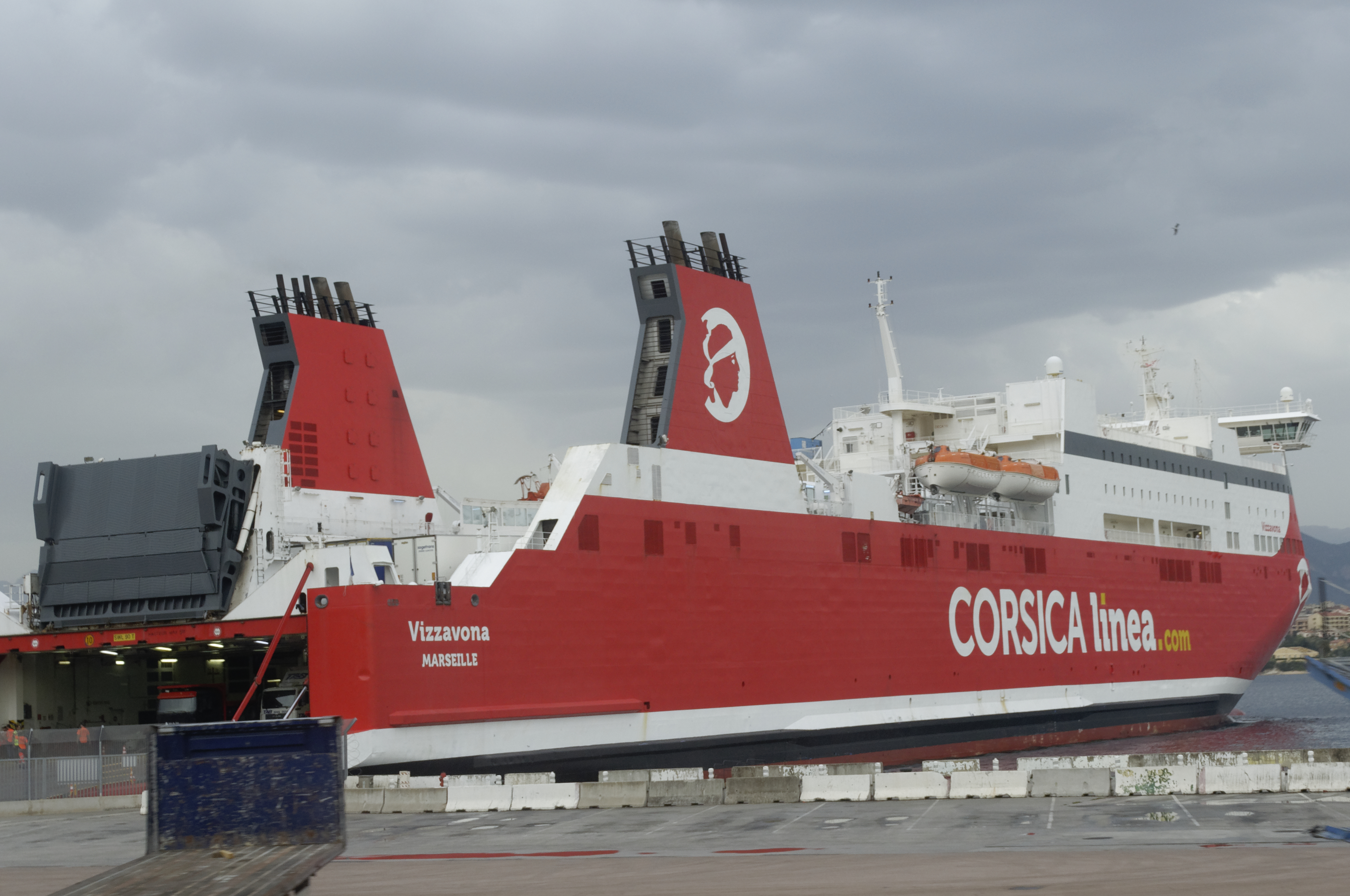 Corsica -mix- 2019